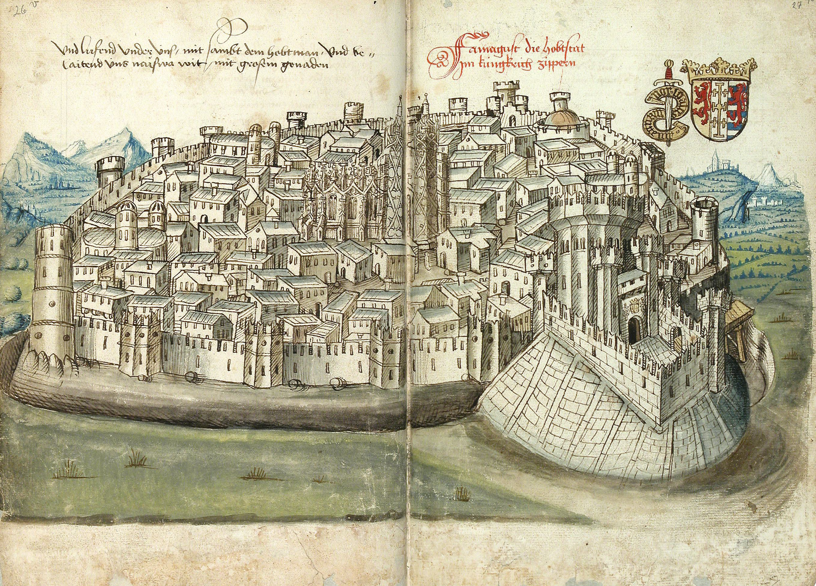 Doppelseite, aus Conrad Grünenberg: Beschreibung der Reise von Konstanz nach Jerusalem. Bodenseegebiet, um 1487. Badische Landesbibliothek Karlsruhe, Cod. St. Peter, pap. 32.